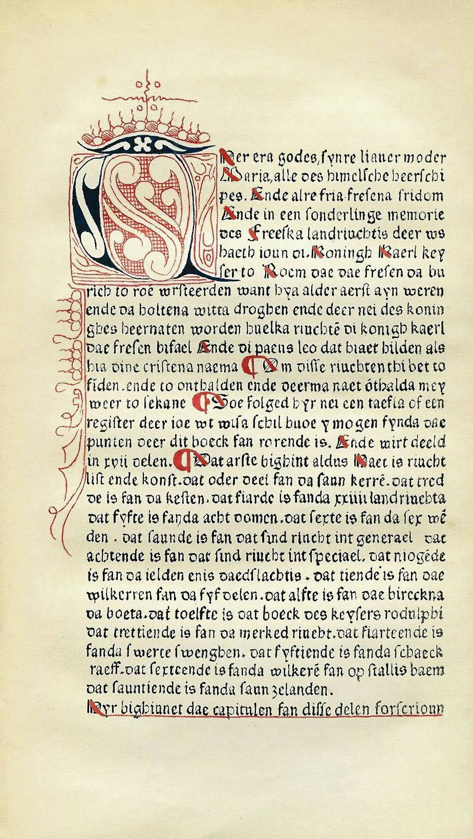 Earste side fan it Freeska Landriucht, de ienige Aldfryske ynkunabel. Wurdt ek wol Alde Druk of Druk neamd.